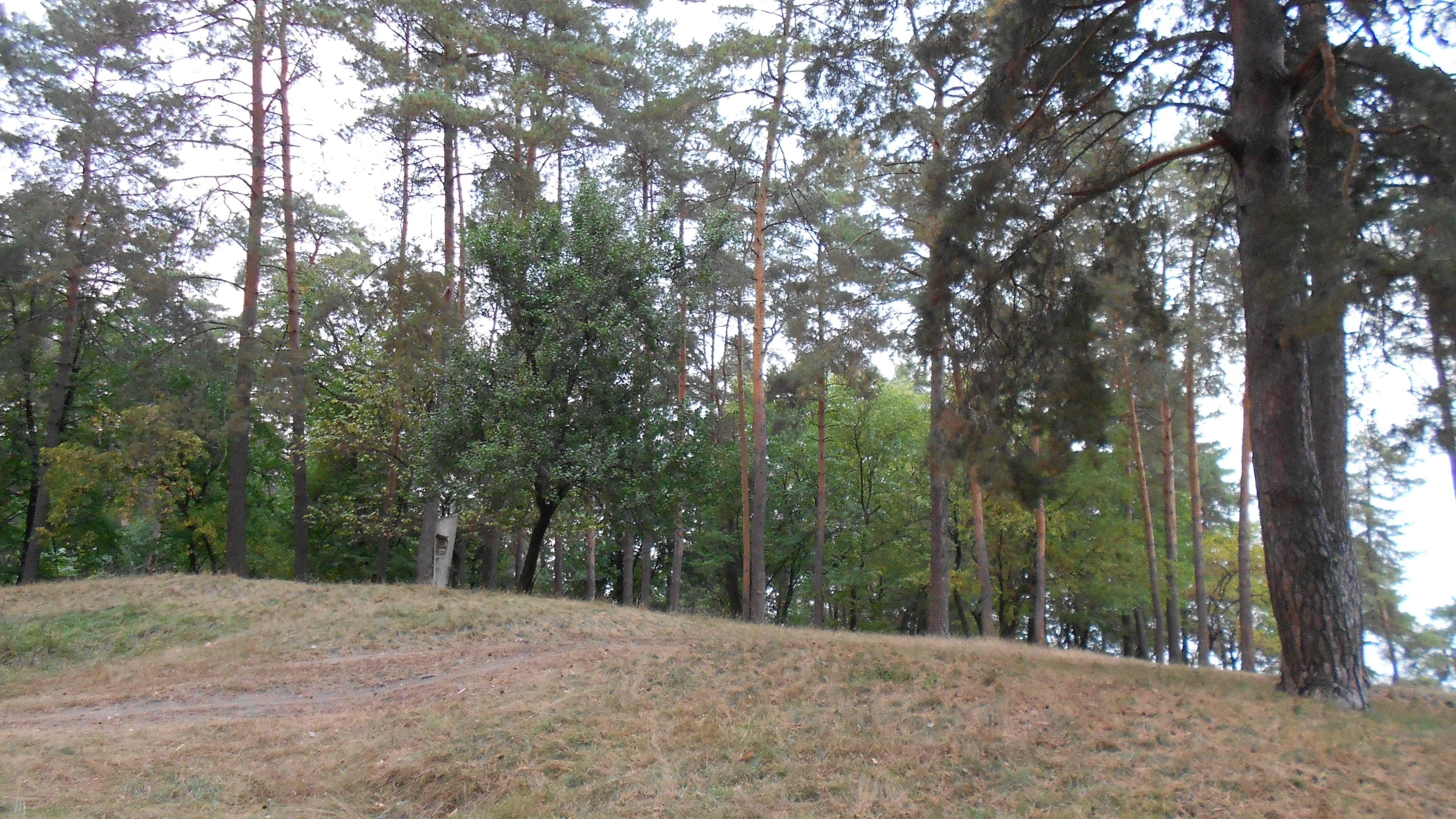 71-101-0003, Городище, м.Черкаси, Дахнівка, г.Василиця